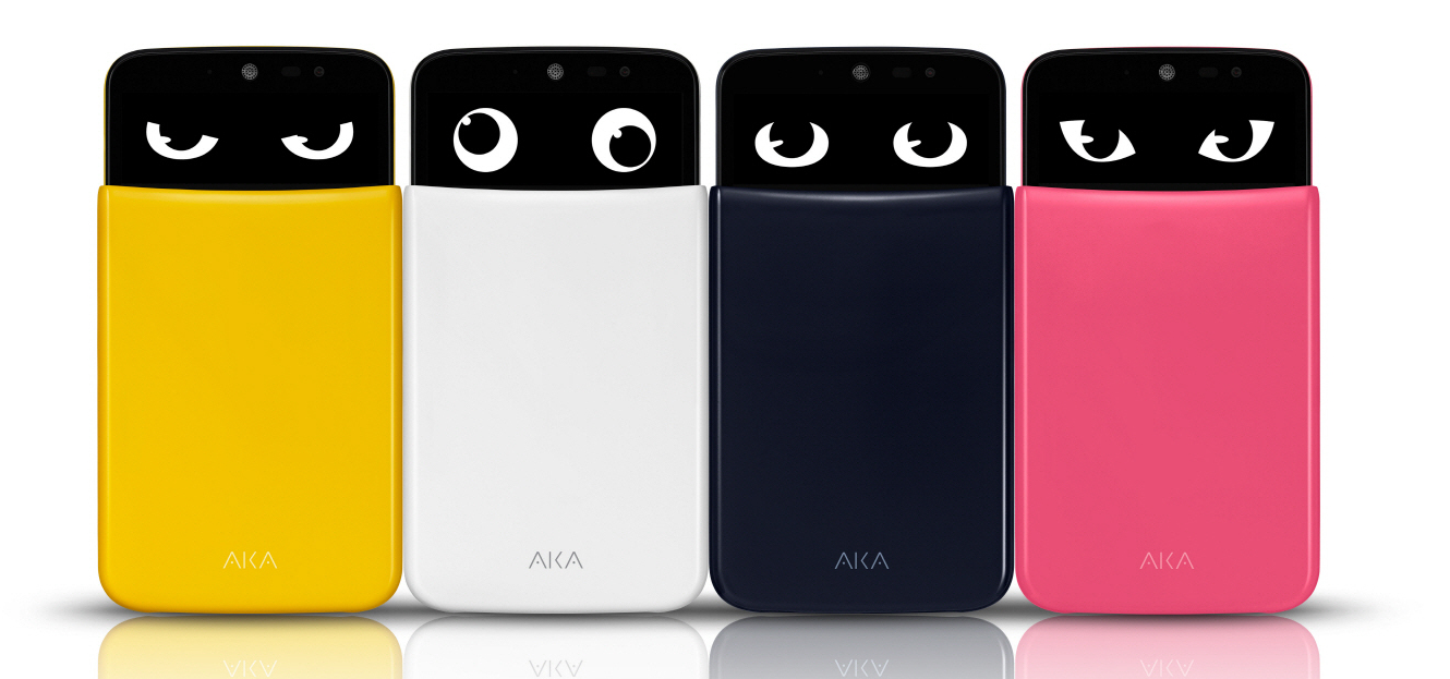 LG전자, ‘나만의’ 스마트폰 ‘아카(AKA)’ 국내 출시 ■ 세계 최초 ‘성격있는’ 스마트폰 □ 구입할 때부터 4가지 페르소나(성격) 중 선택함으로써 각기 다른 ‘움직이는 눈동자’ 형상, 컬러, UX(사용자경험), 효과음 사용 가능 ■ 화면 상단의 ‘움직이는 눈동자’ 형상으로 사용자와 감성적 대화 □ 세계 최초 전면 슬라이드 커버 ‘마스크(Mask)’ 적용 ■ 사용자가 직접 꾸미는 신개념 ‘DIY(Do It Yourself)’ 콘텐츠 제공 ※ Social LG전자 ( 에서 관련 보도자료를 확인하실 수 있습니다.